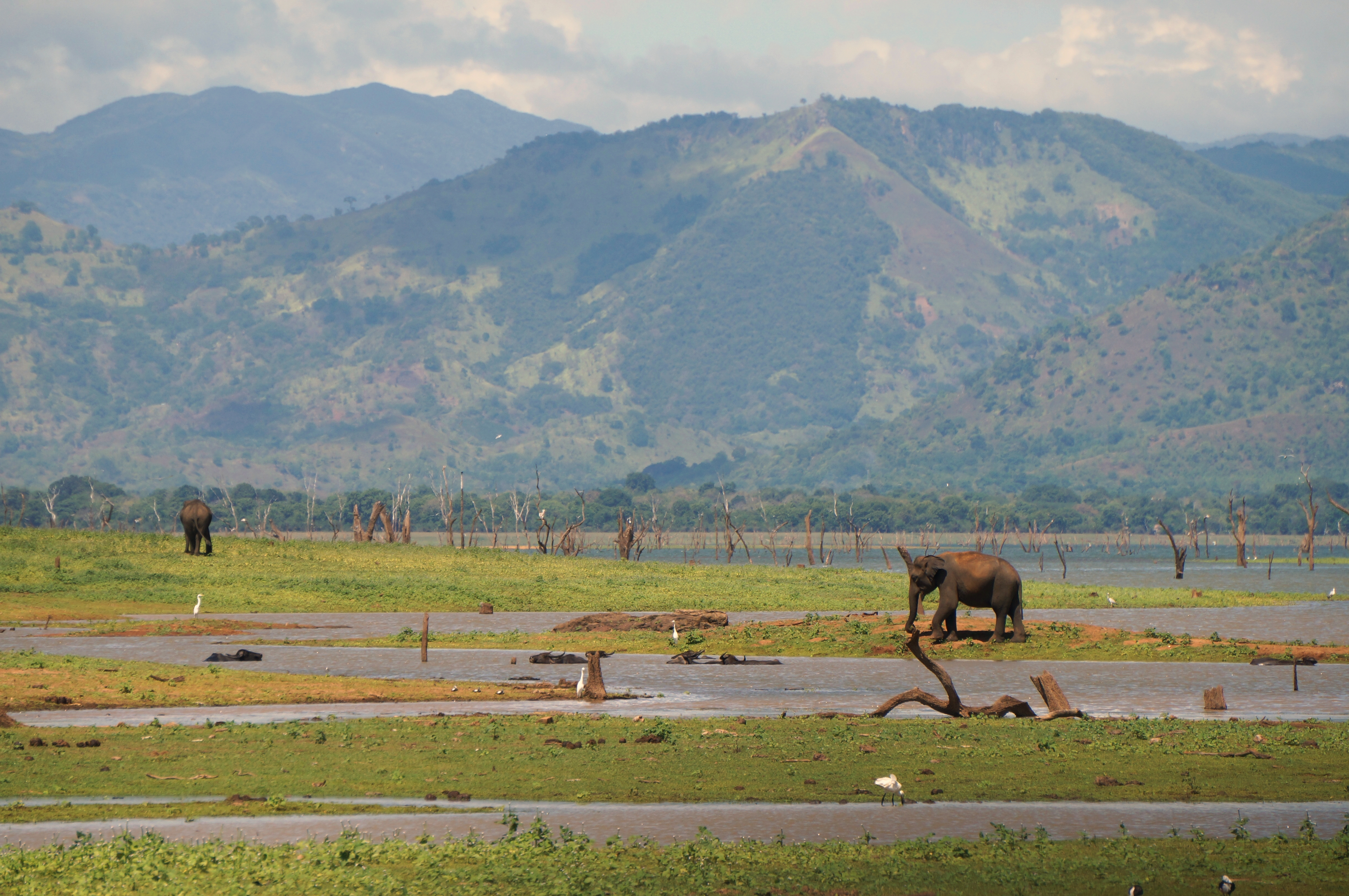 Elephants maximus maximus du parc national de Uda Walawe National District de Monaragala au Sri Lanka